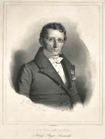 Bernhard Michael von Grandauer (1776-1838), Bayerischer Staatsrat